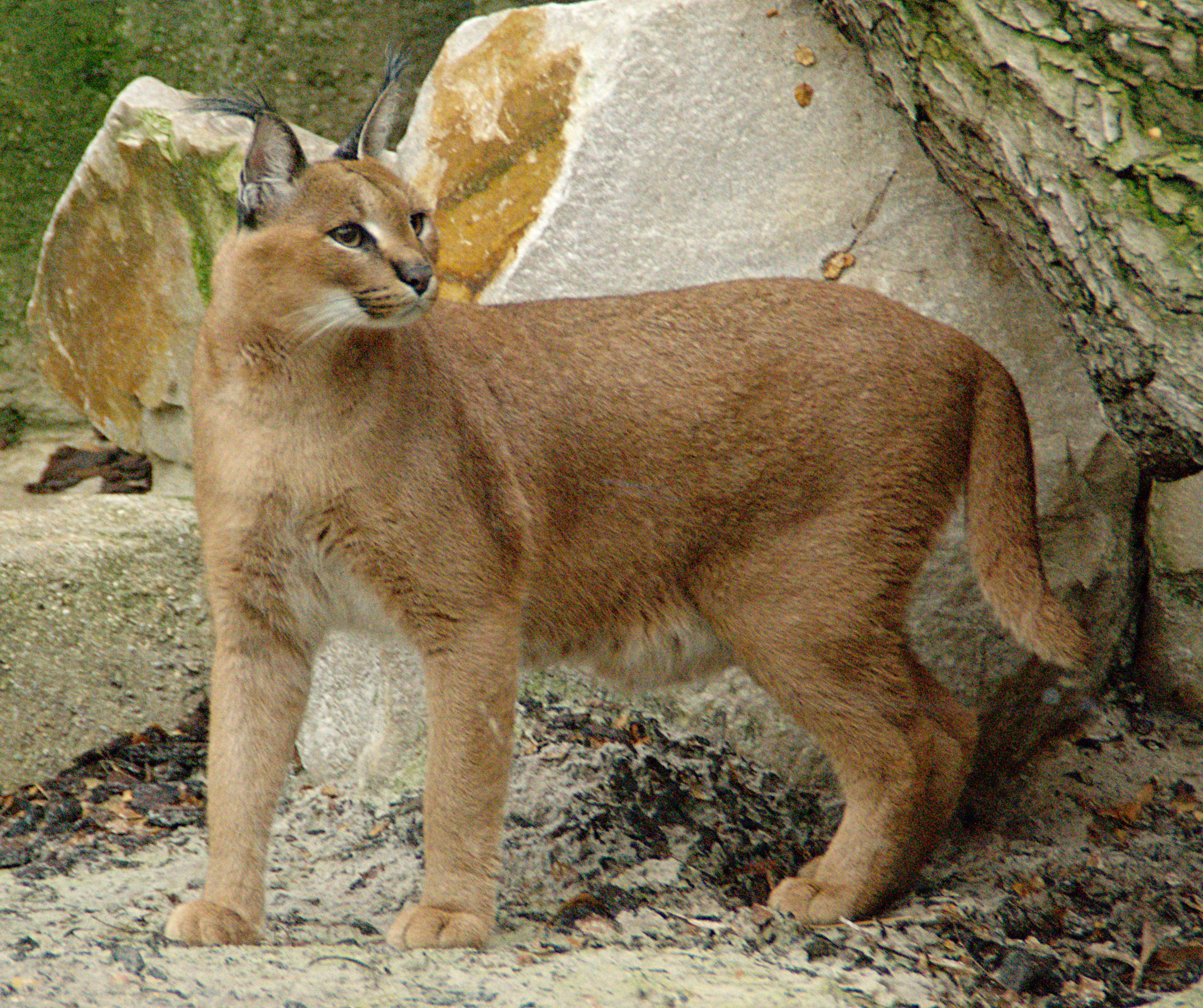 Caracal dans une cage à la ménagerie du jardin des plantes à Paris